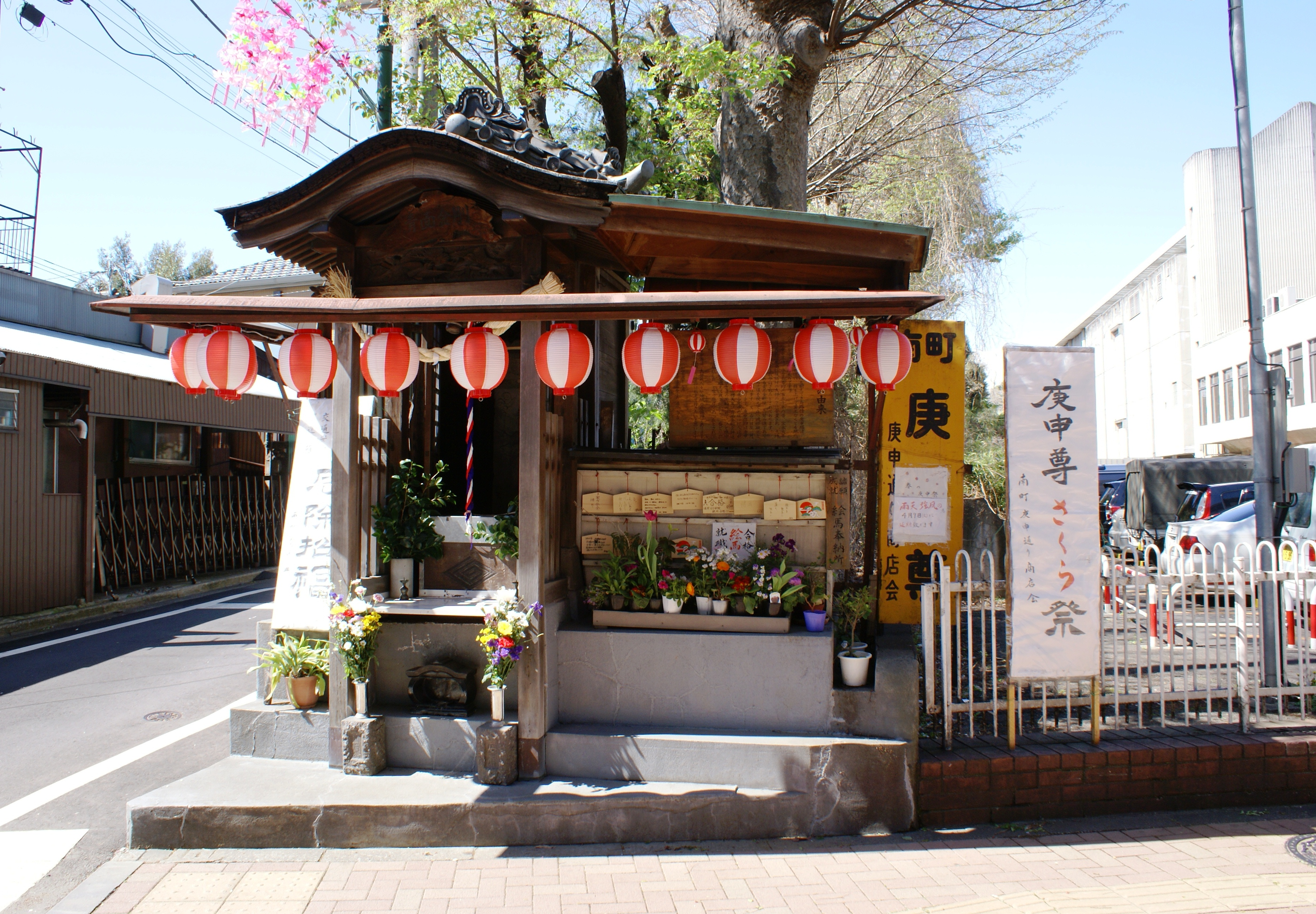 南町庚申尊